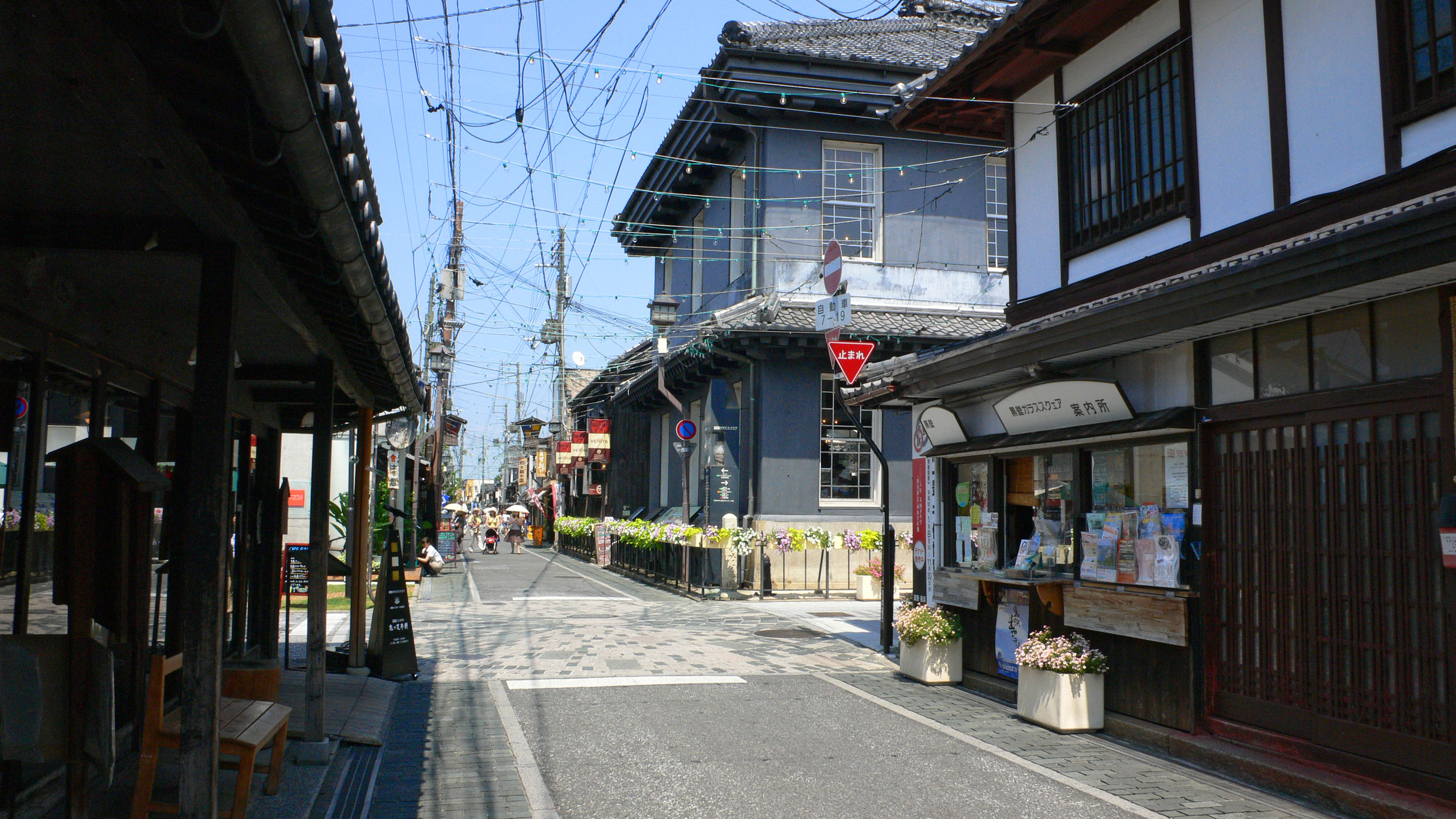 Kurokabe Square in Nagahama, Shiga, Japan